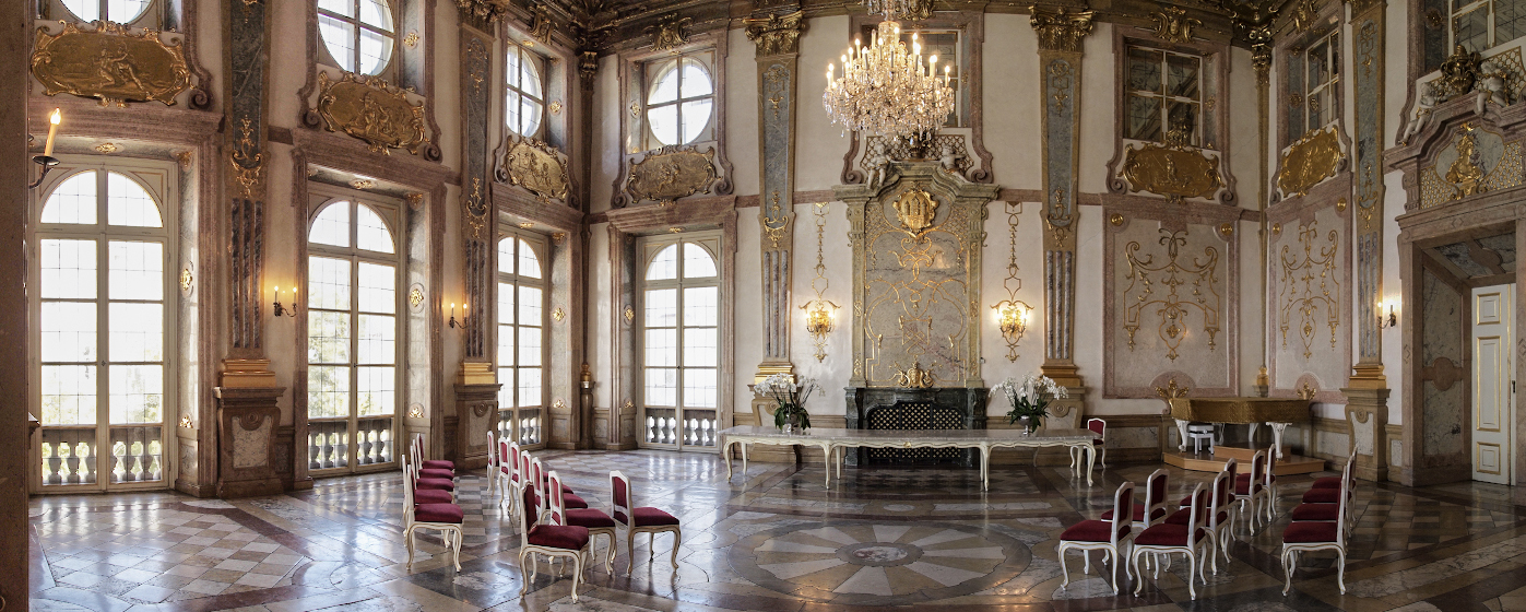 Schloss Mirabell Gesamtanlage mit allen Nebengebäuden und Gartenbaudenkmalen